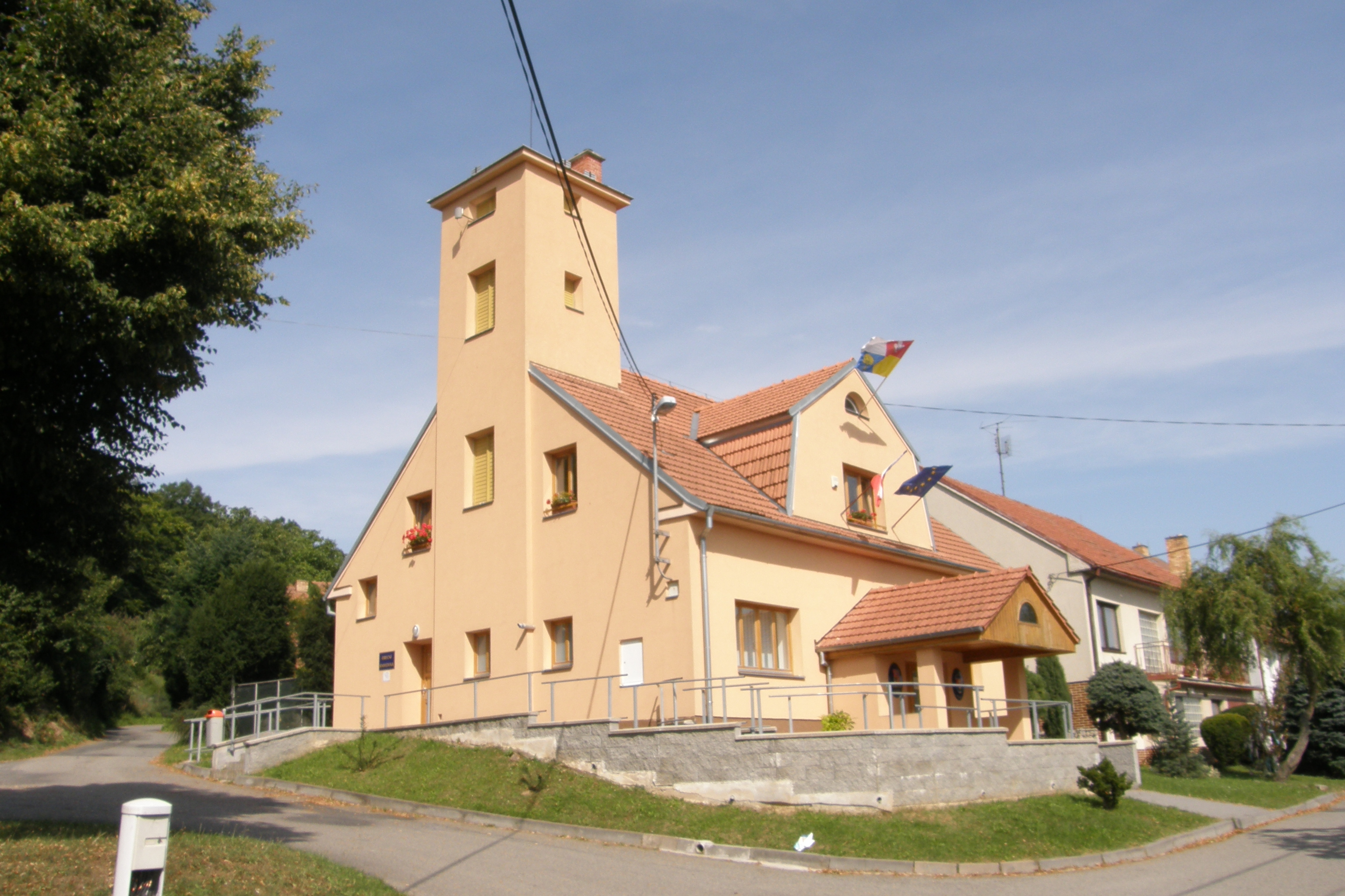 Obecní úřad ve Svinošicích